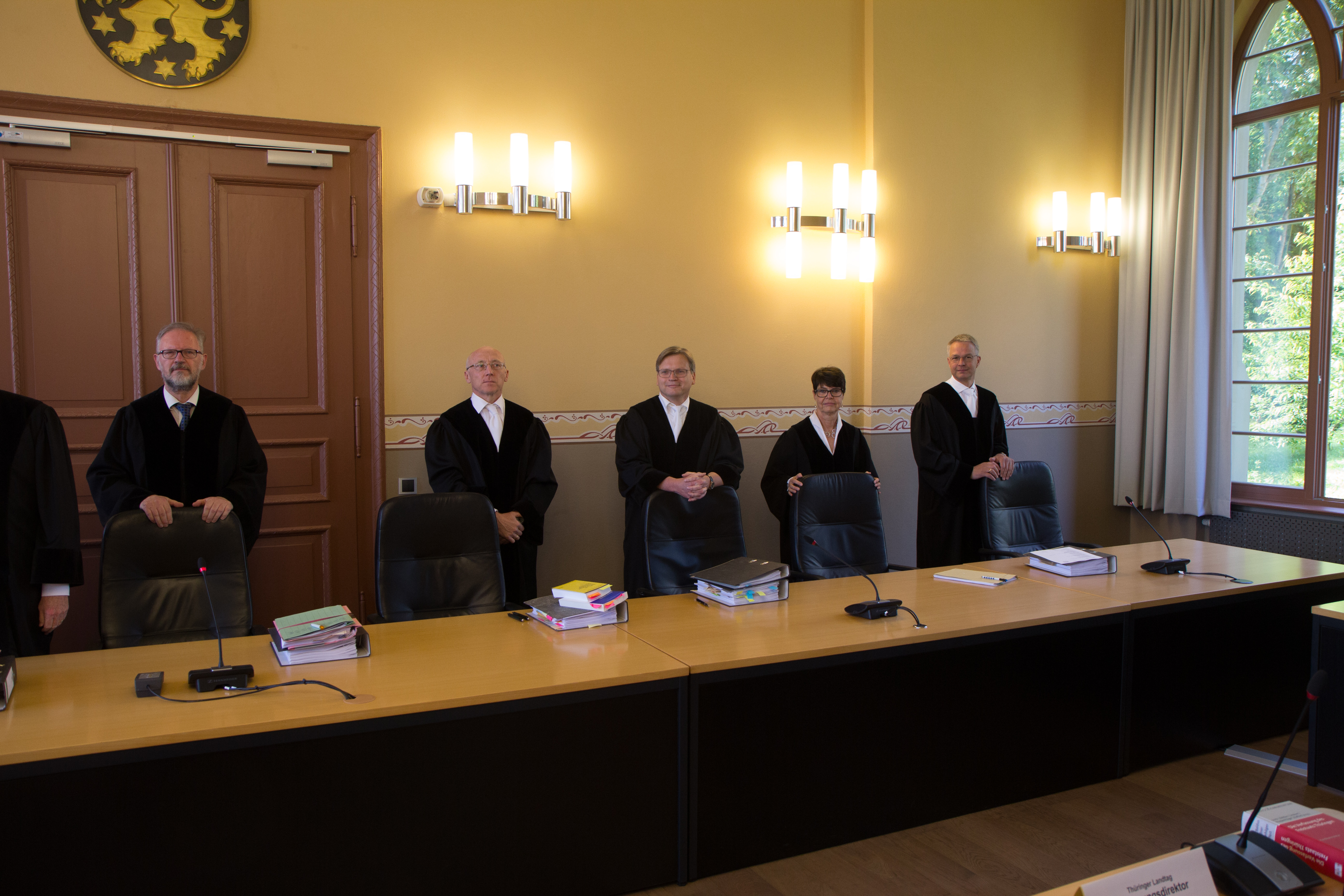 Thüringer Verfassungsgerichtshof. Öffentliche Sitzung am 14. Juni 2017 in Weimar